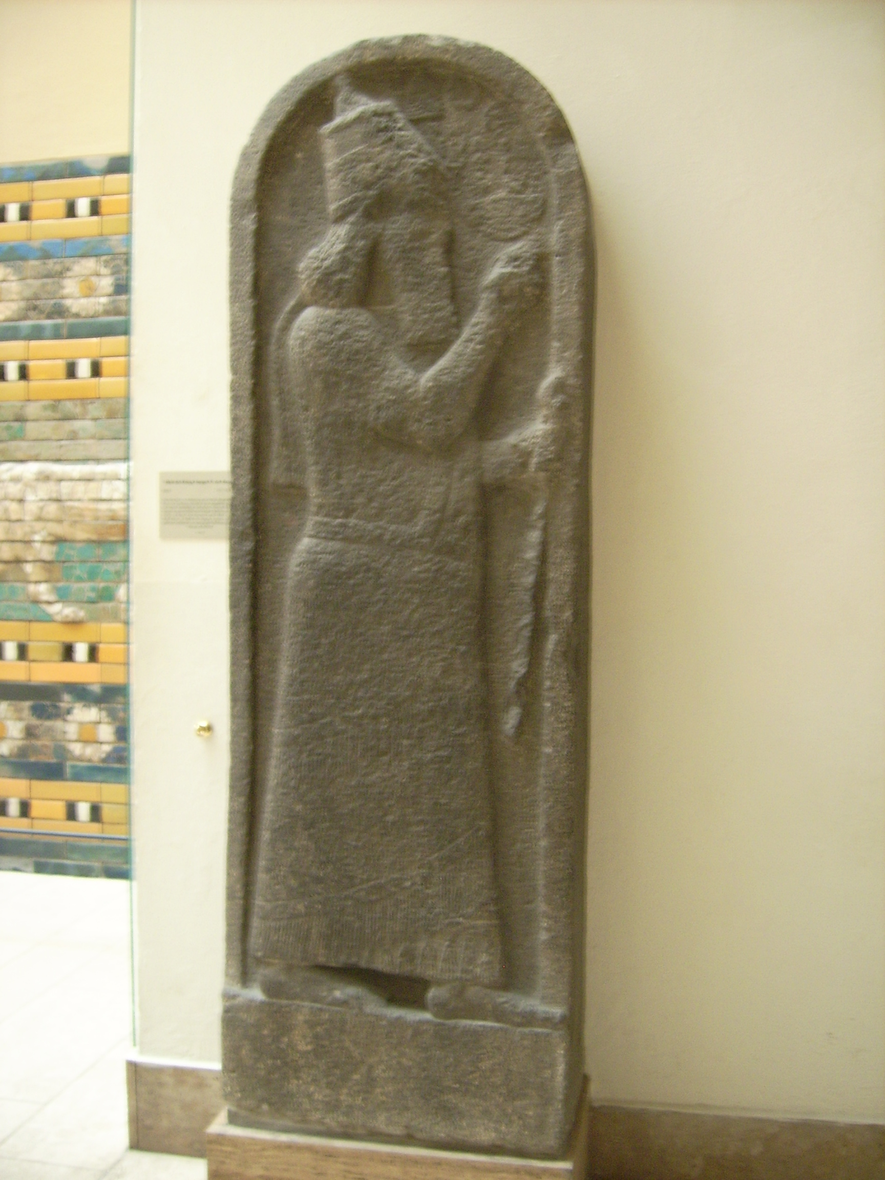 Sargon II (Gaston Maspero)